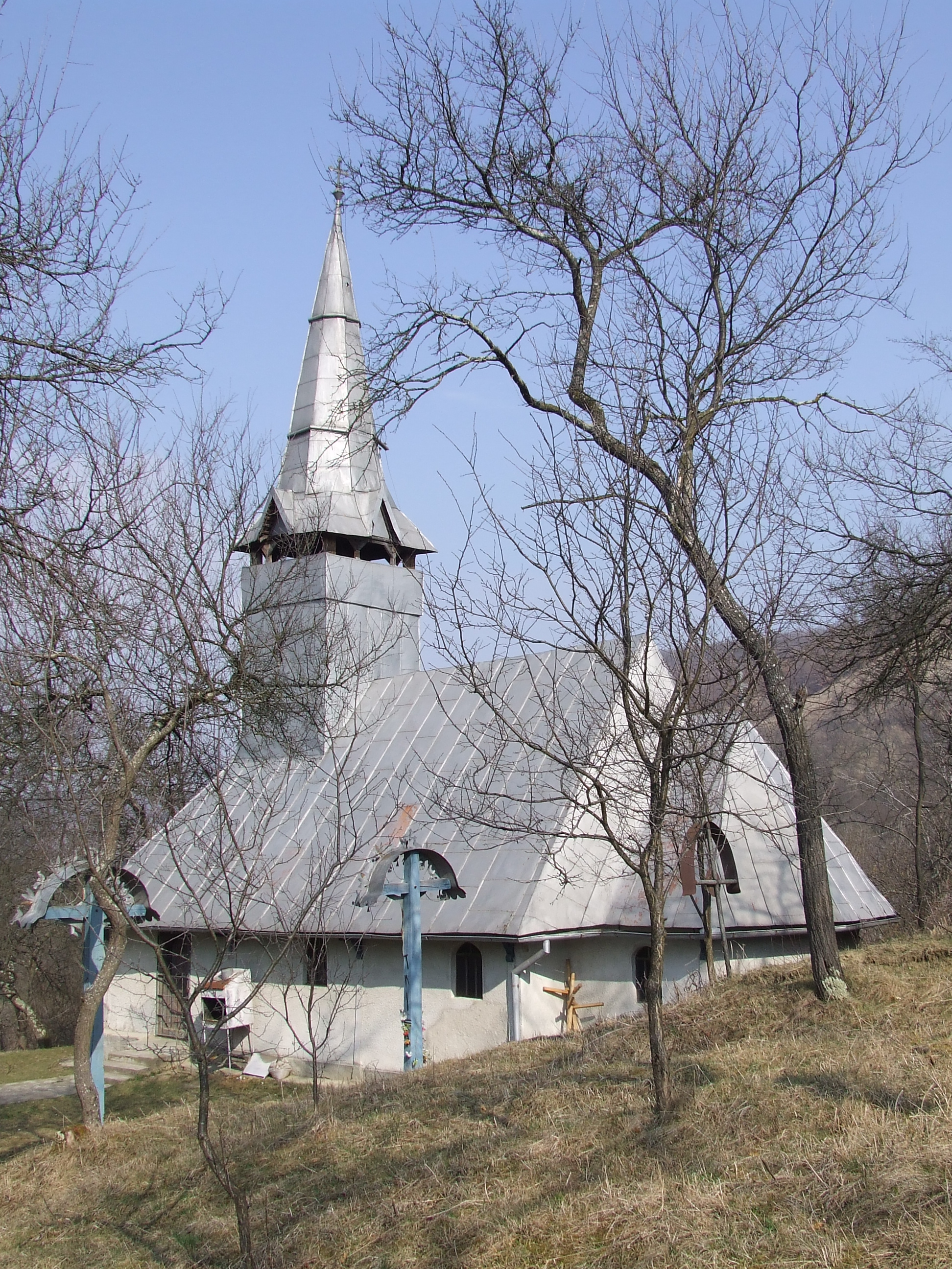 Biserica de lemn din Borşa (Cluj)